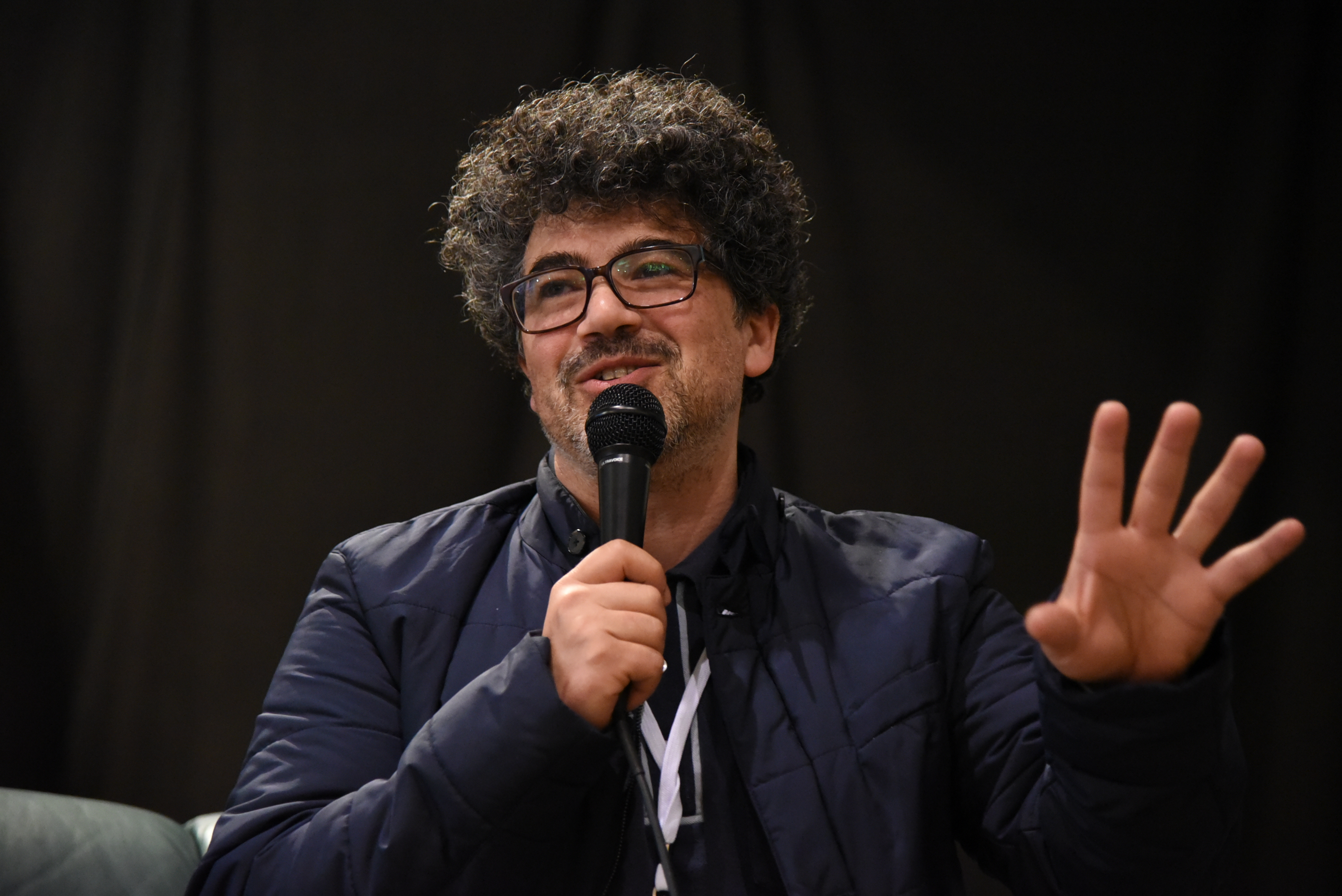 Miltos Yerolemou